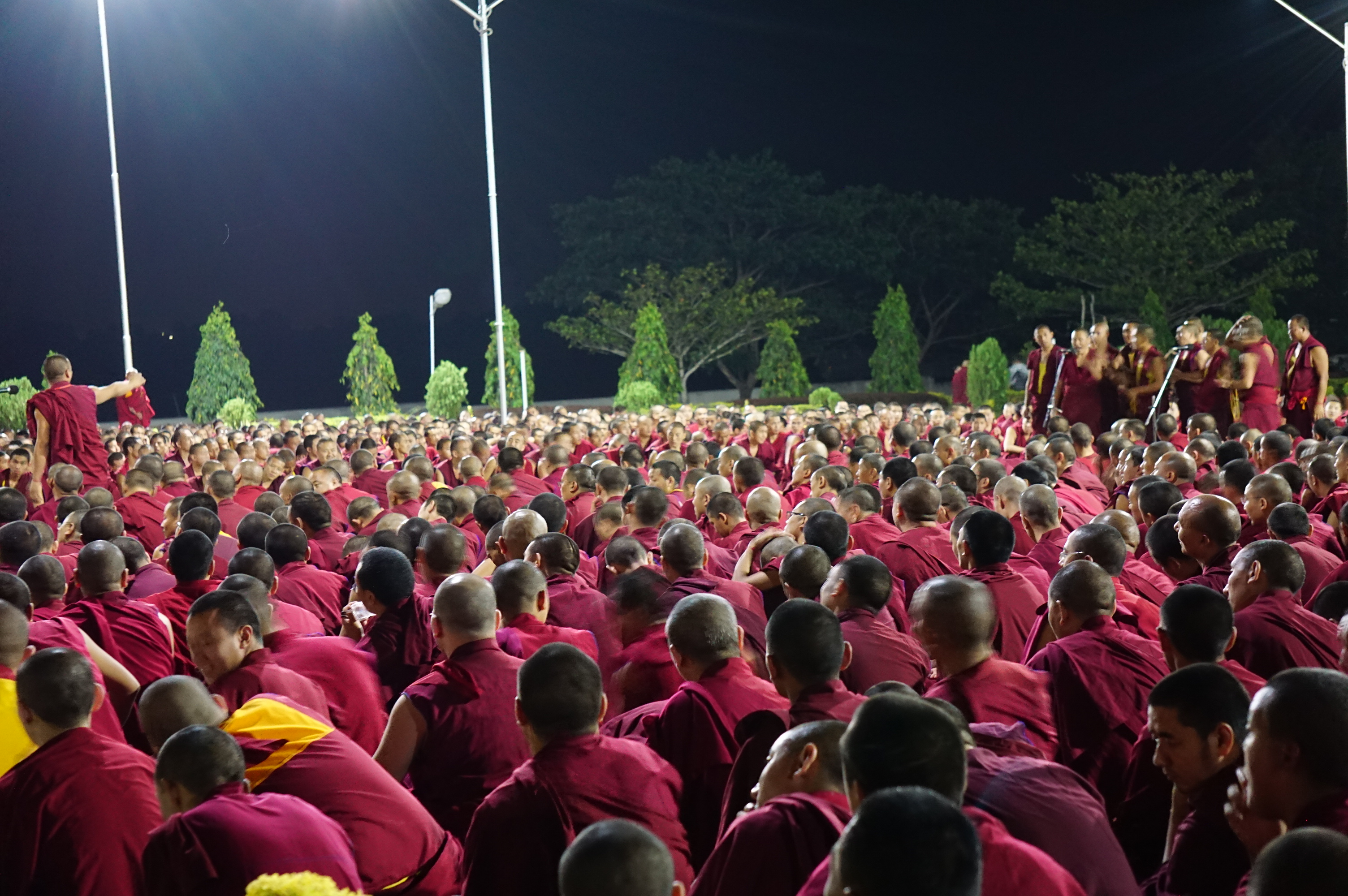 Debate Night - Drepung Loseling Monastery (Karnataka - India)